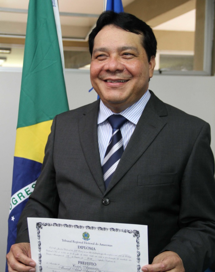 Diplomação do prefeito de Coari Adail Pinheiro.